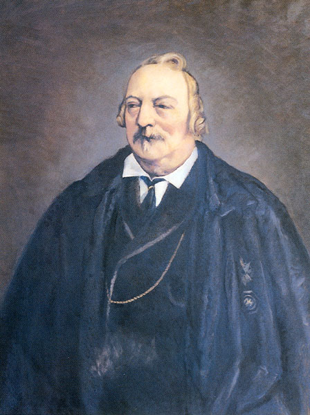 Francesco Carrara (1805–1888), Italian jurist.